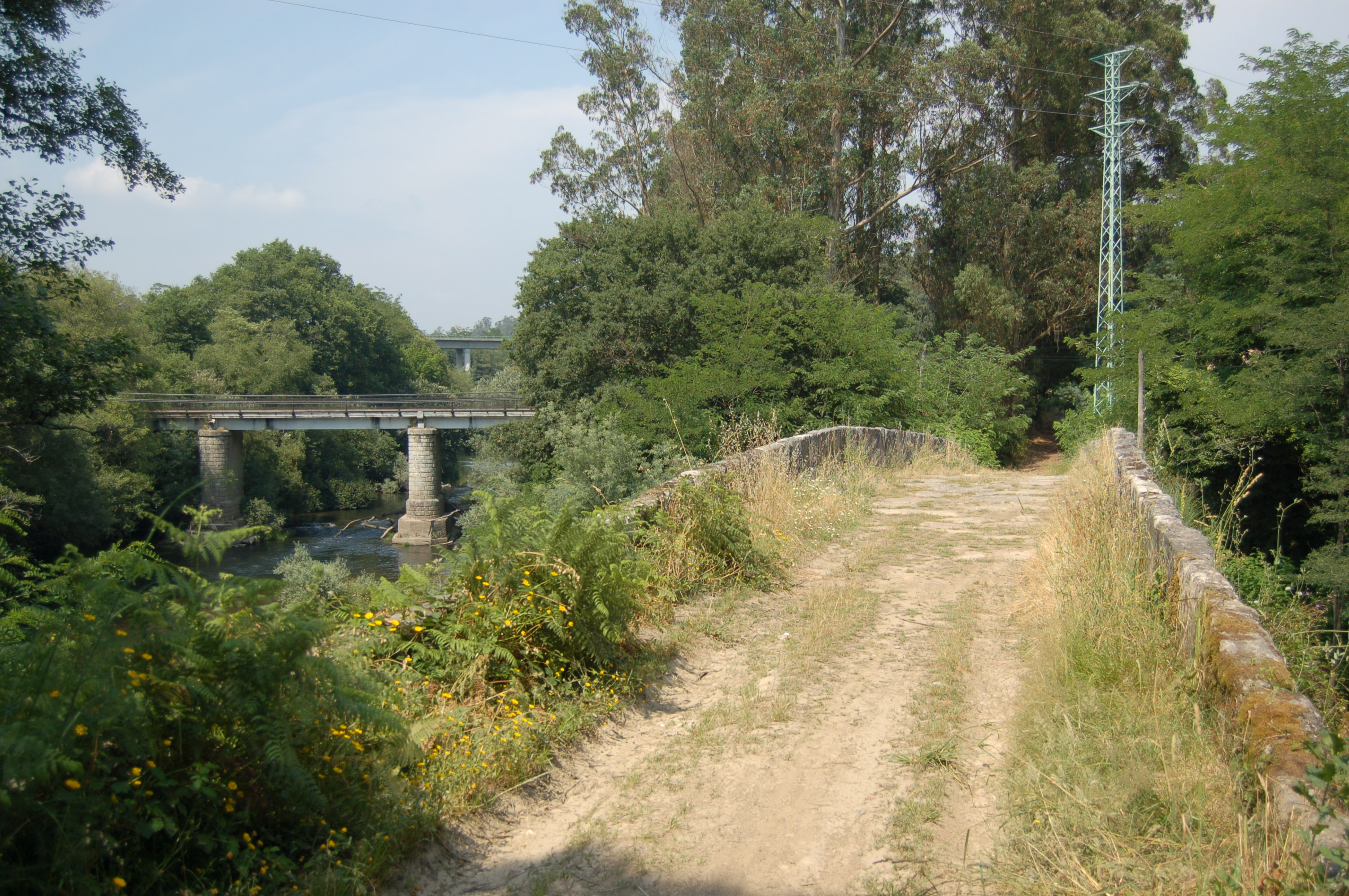 Vista de tres pontes sobre o río Tea, preto da súa desembocadura; a ponte medieval da Fillaboa, a da estrada vella a Caldelas de Tui, e a da nova estrada PO-510